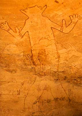 Es obvio el parecido con las imágenes de la película. ¿Se parece, o no?.